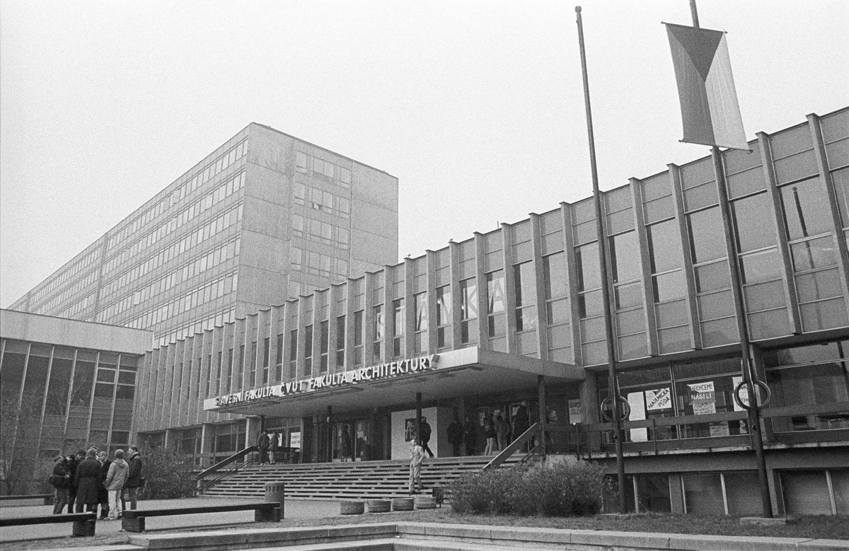 České vysoké učení technické, Praha 6 - Dejvice, budova B a C, fakulta stavební a fakulta architektury, 21. listopadu 1989